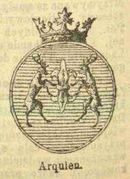 Ilustracja przedstawiająca herb Aquien